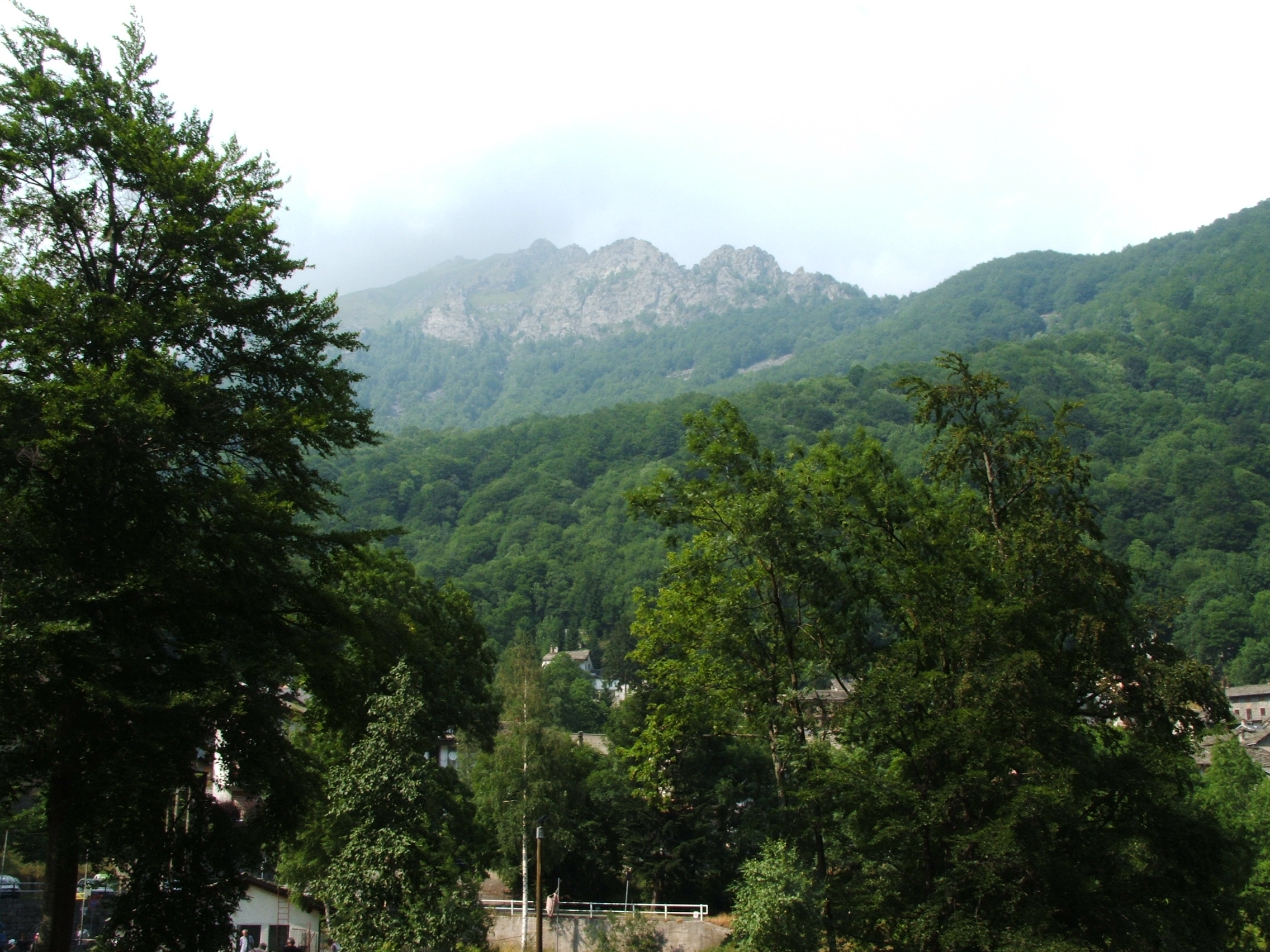 Piedicavallo, comune della Valle Cervo, provincia di Biella (Piemonte, Italia)